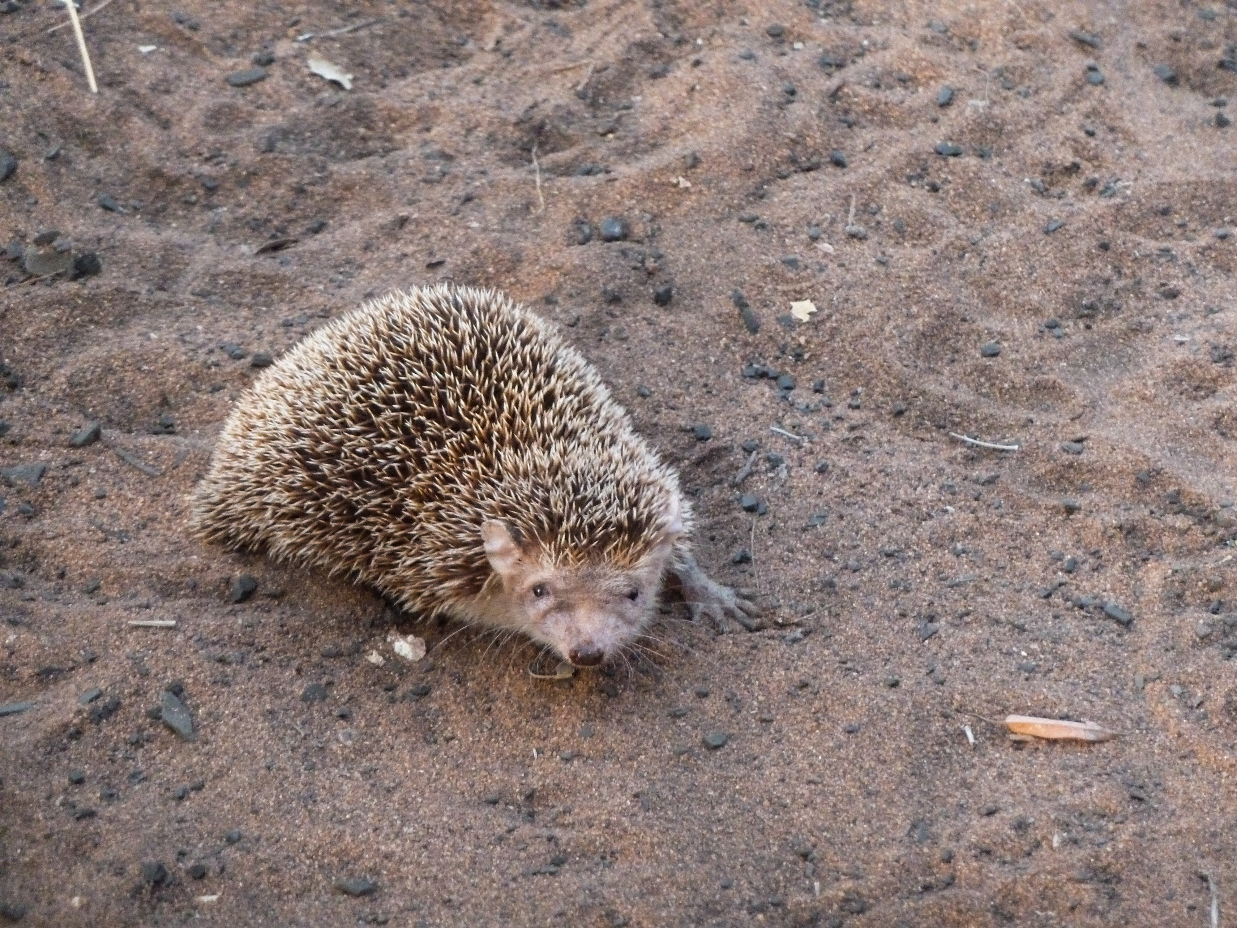 Kleine egeltenrek in het réserve naturelle Reniala nabij Ifaty